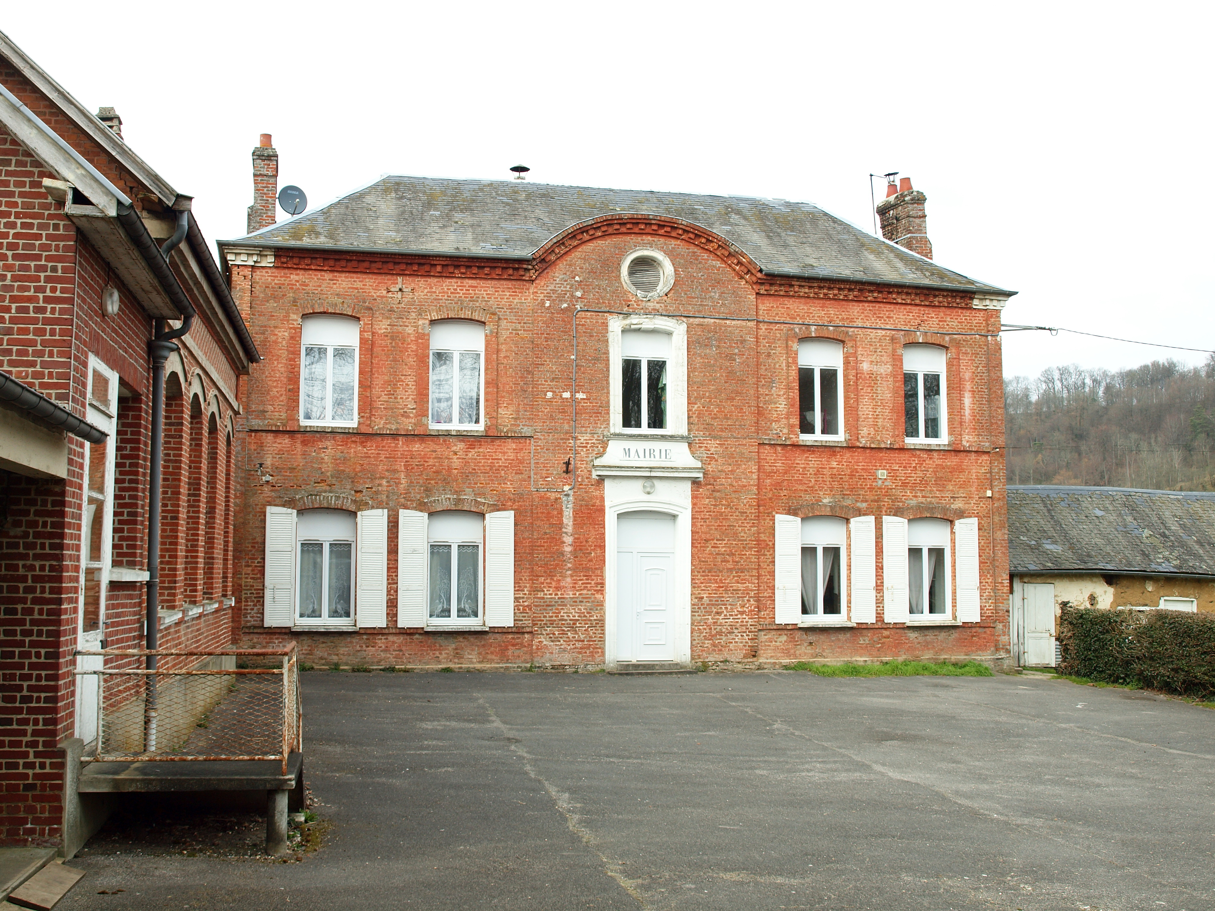 Inval-Boiron (Somme, France)